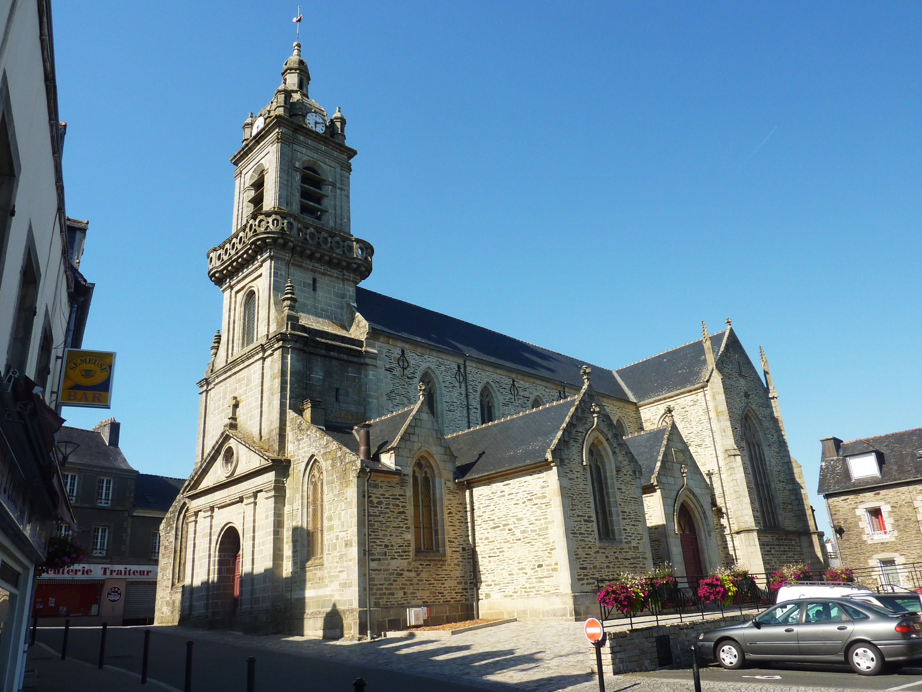 Châteauneuf-du-Faou : Eglise paroissiale, vue d'ensemble